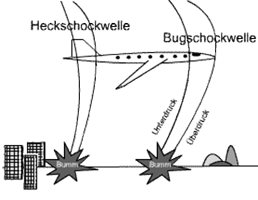 selbst gezeichnet, in der vierten Version überflüssiges Bildweiß und Rahmen entfernt --Carl Projekt neue geeignete Benutzer finden 03:14, 11. Mär. 2008 (CET)